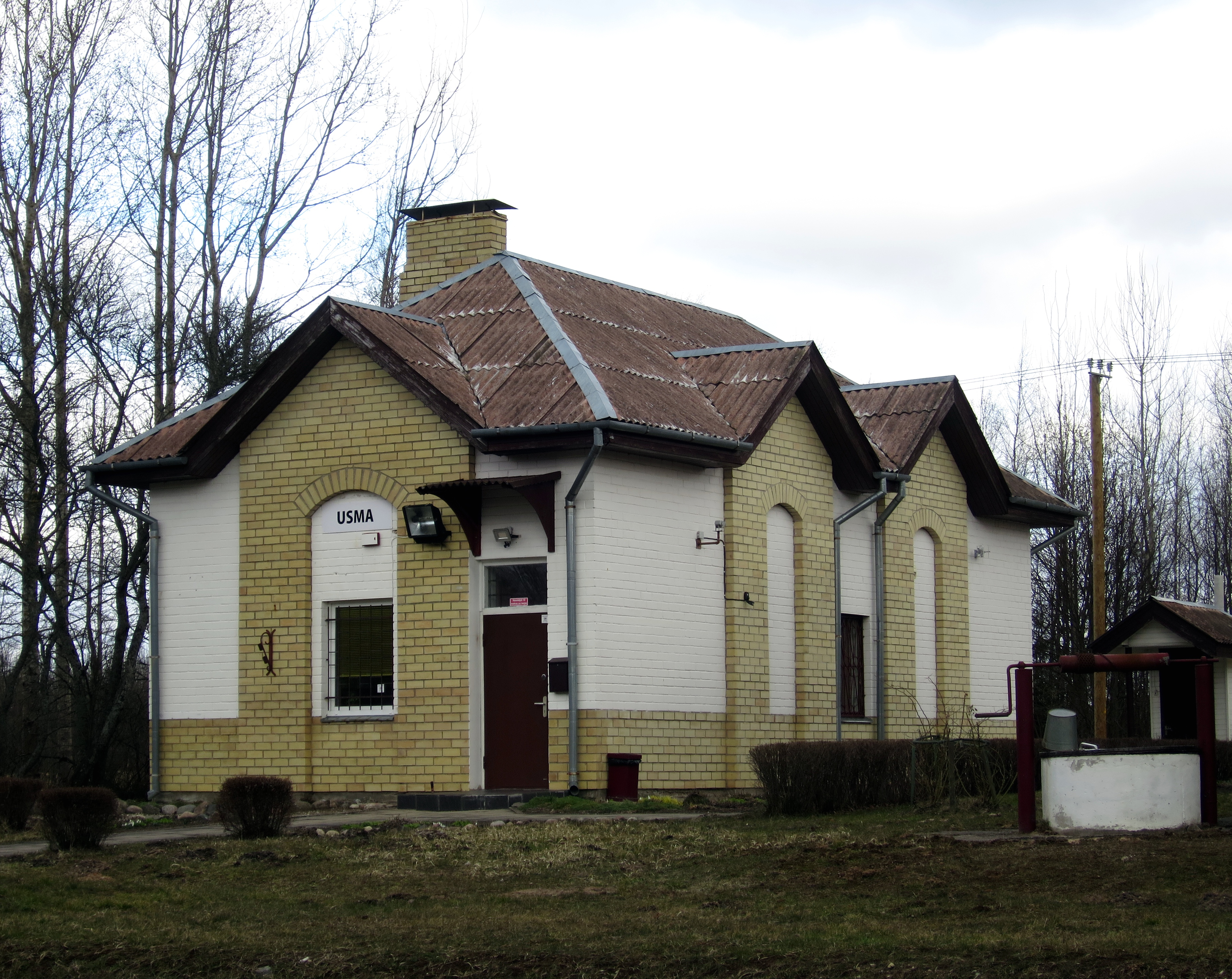 Usmas stacijas ēka